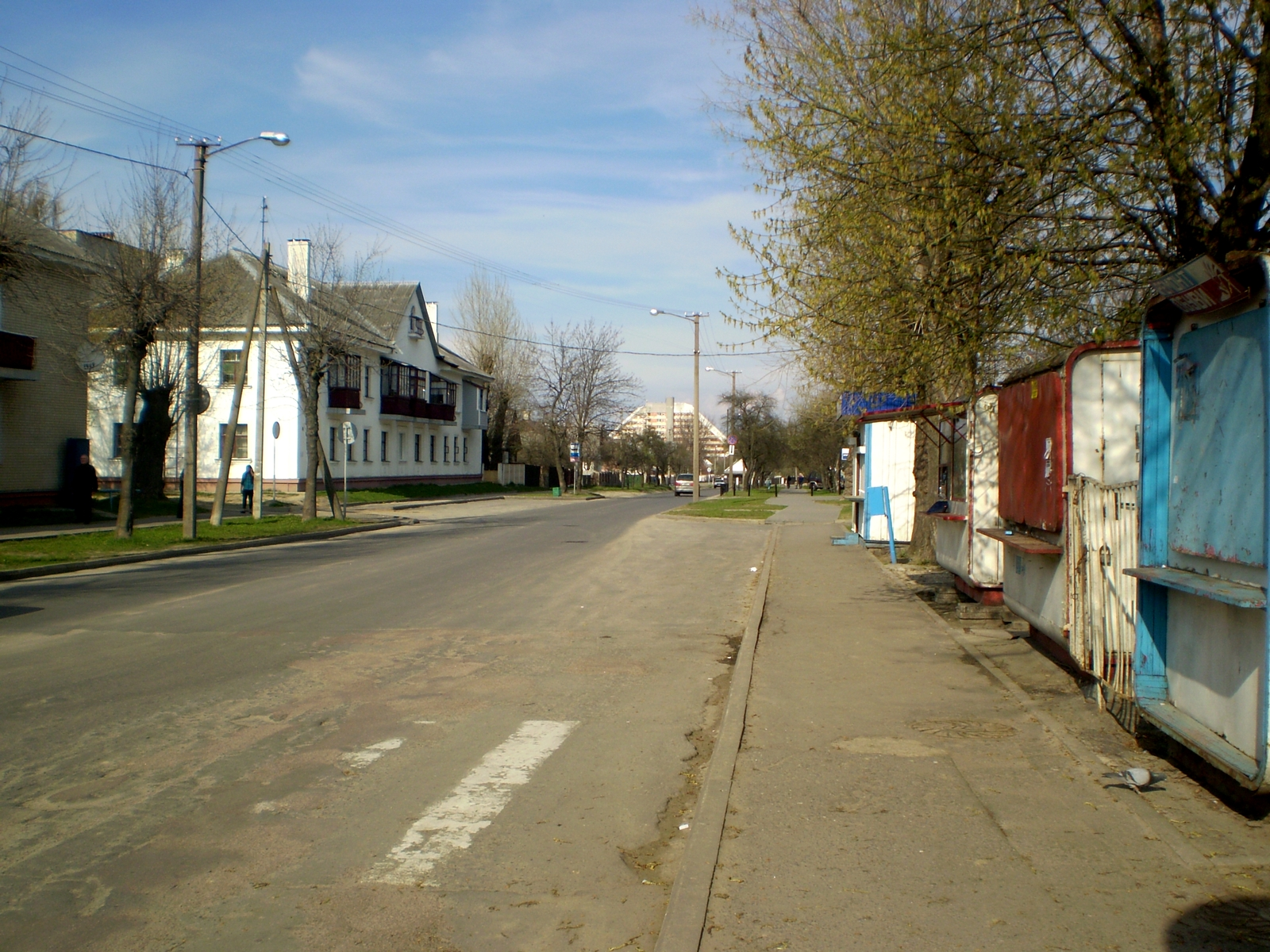 Вул. Кіжаватава